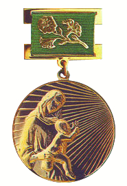 Узбекский орден Soglom avlod uchun